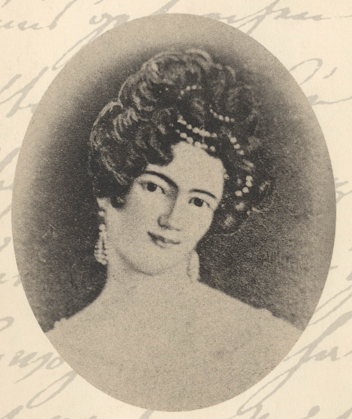 Portrait der deutschen Schriftstellerin Kathinka Zitz-Halein.